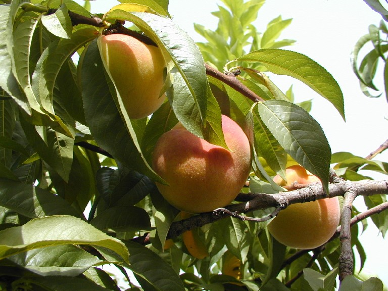 Pesco - Roma